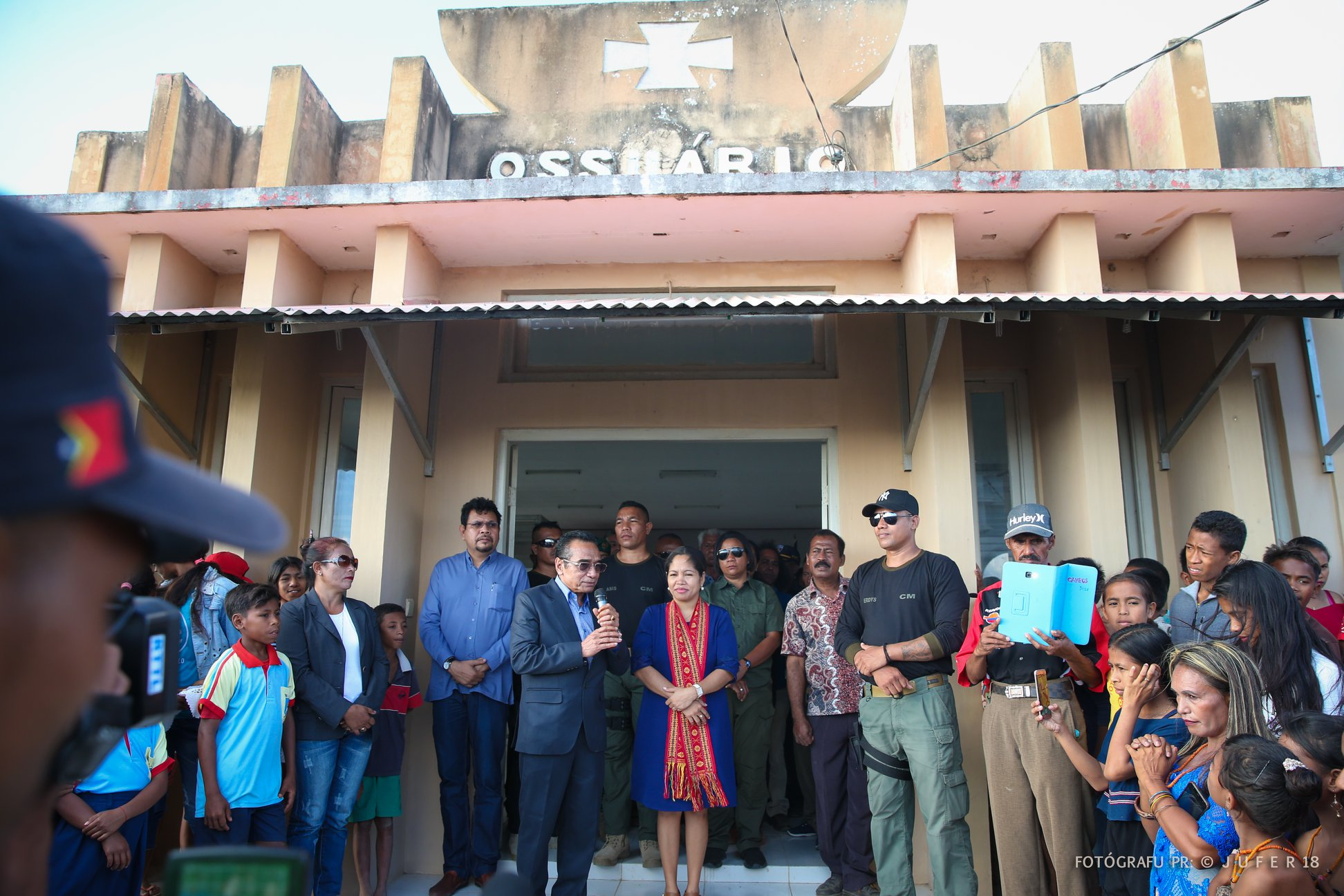 Präsident Guterres und seine Frau Cidália Lopes Nobre Mouzinho Guterres am Beinhaus von Raça.